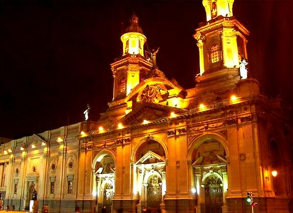 Foto de Catredal de Santiago. Foto: Propiedad de David A. Thackeray. Fuente